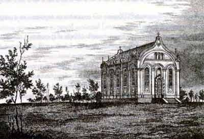 Старе зображення Воскресенської церкви (тепер - Св. Марії Магдаліни) в Одесі